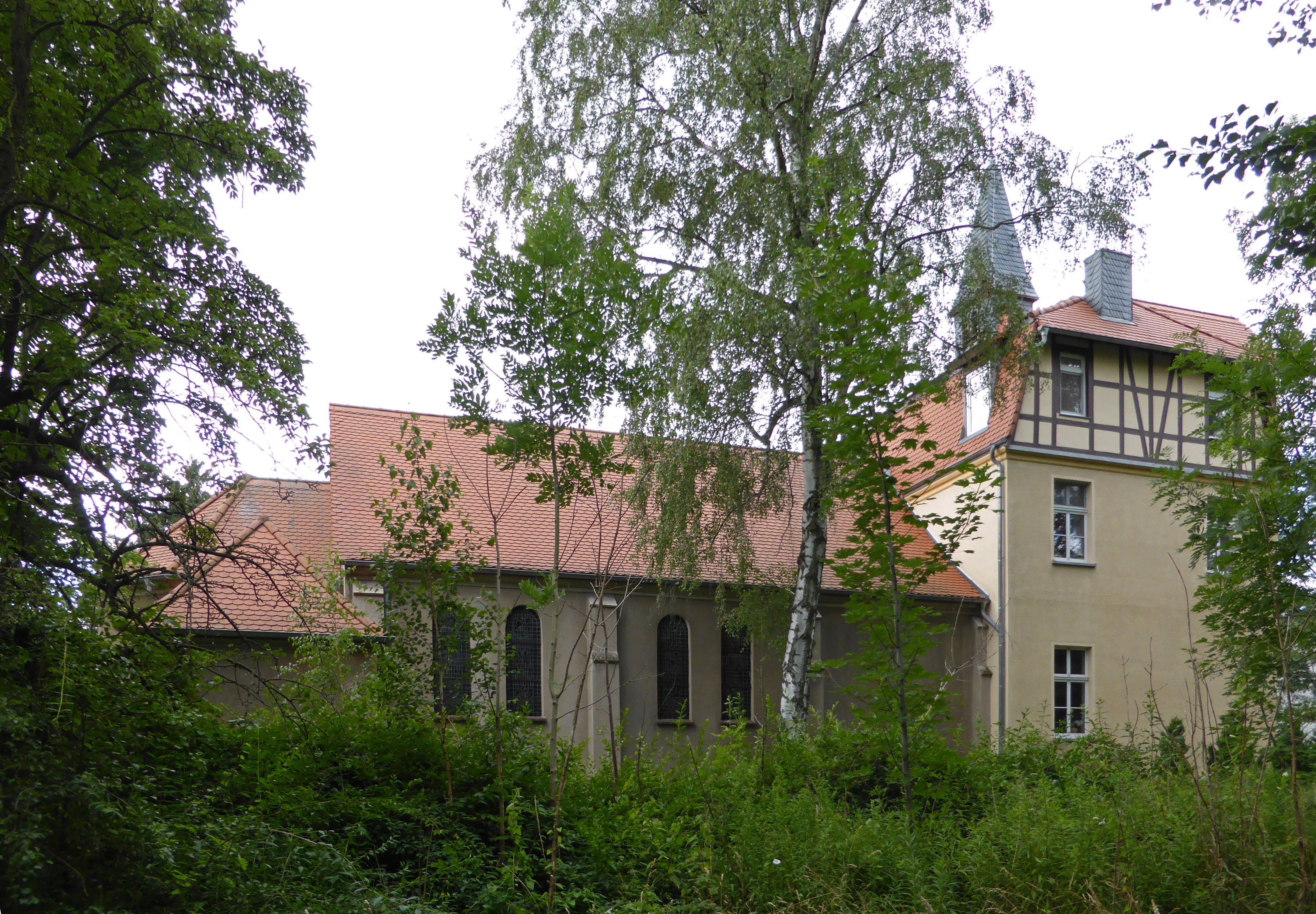 Loburg, Gesamtansicht von katholischer Kirche und Pfarrhaus.